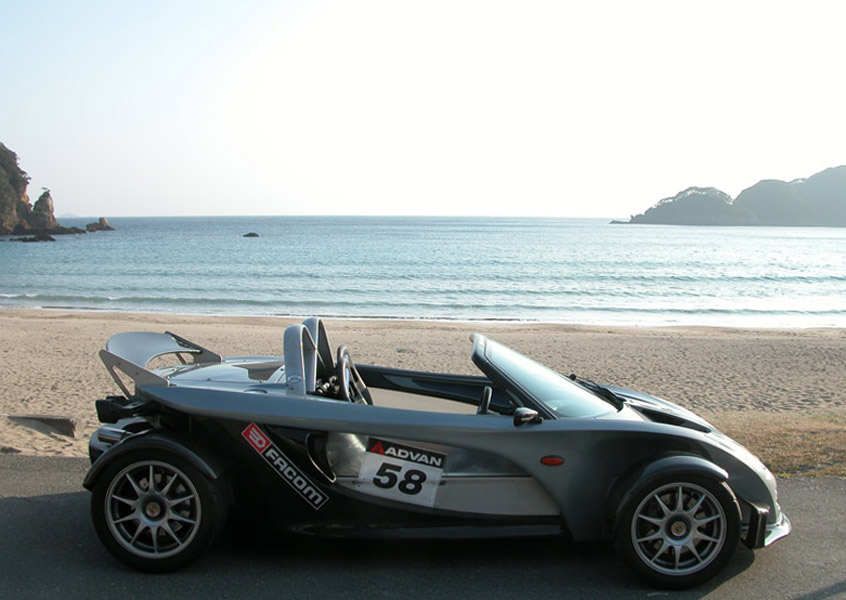 Lotus 340R-03.jpg